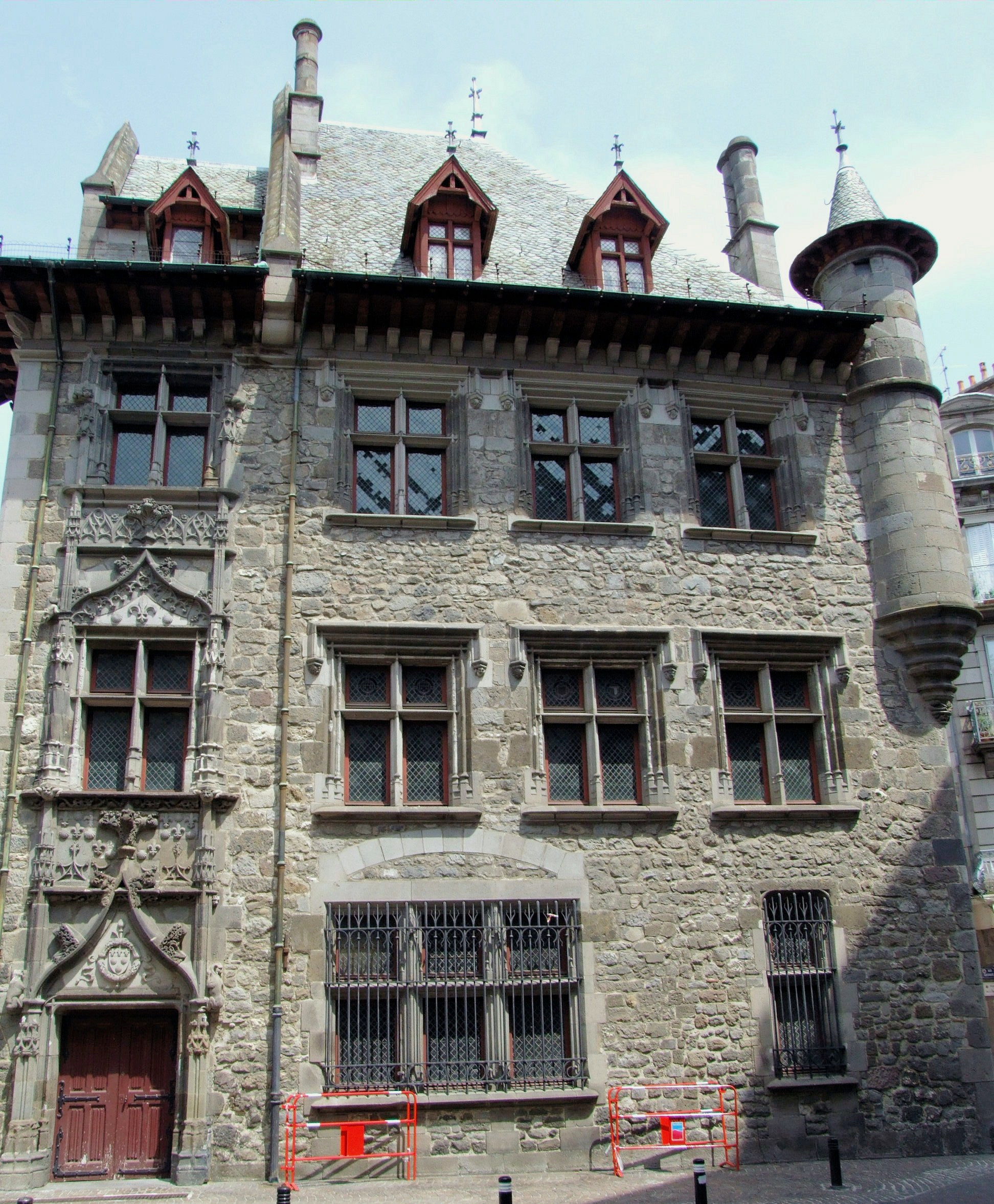 Aurillac - Maison consulaire